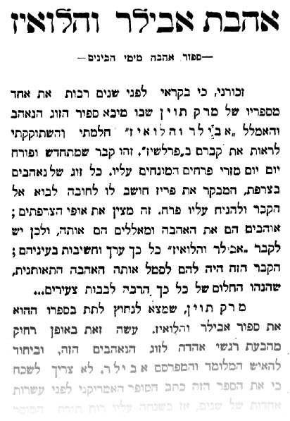 סיפורם של אבלר ואלואיז